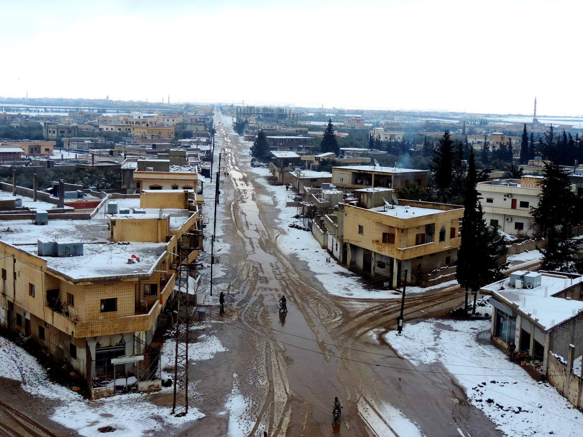 صورة من الأعلى للثلوج التي غطت البلدة بداية عام 2015